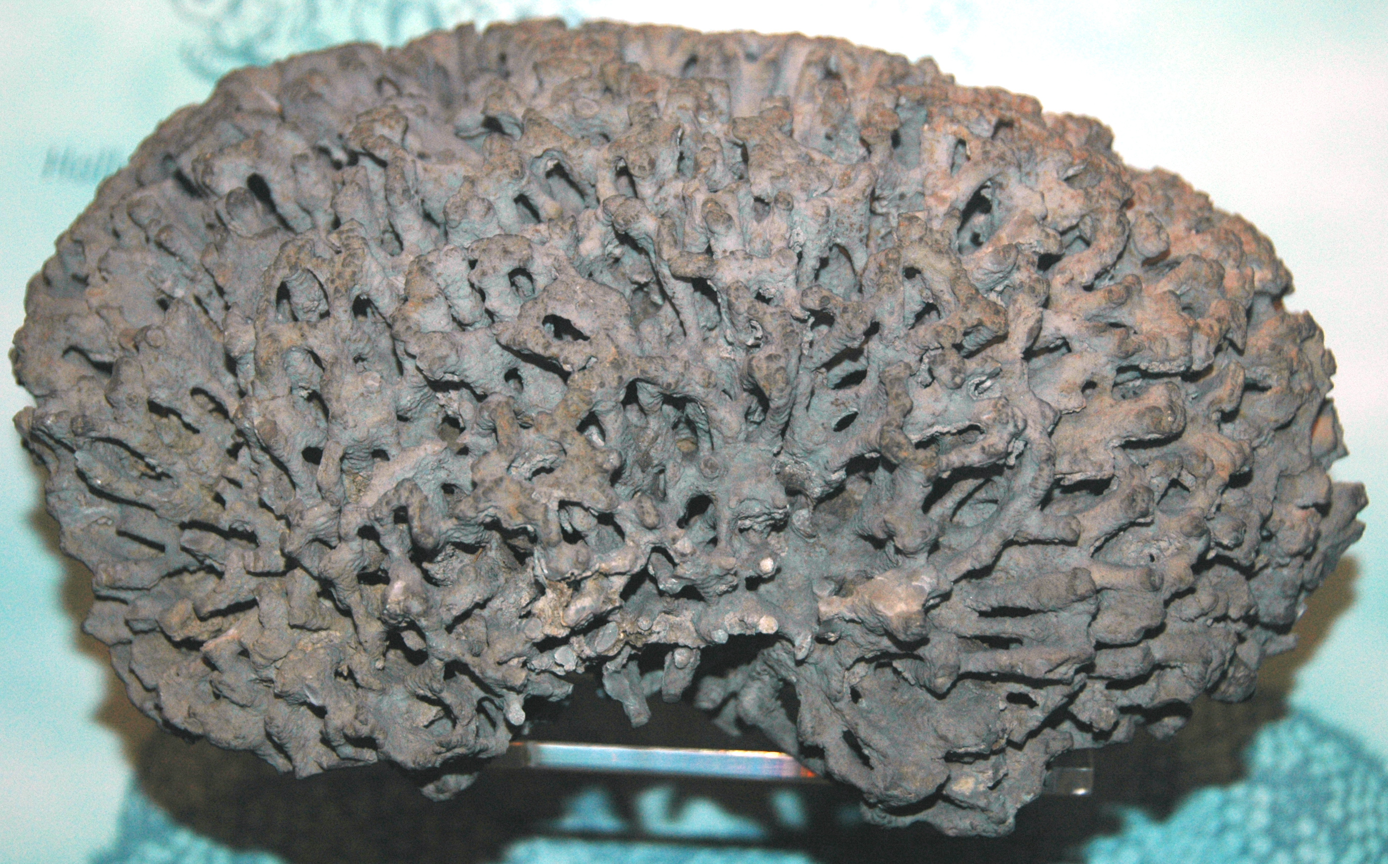 Hallopora multitabulata fossil bryozoan (Ordovician; Frankfort, Illinois, USA)